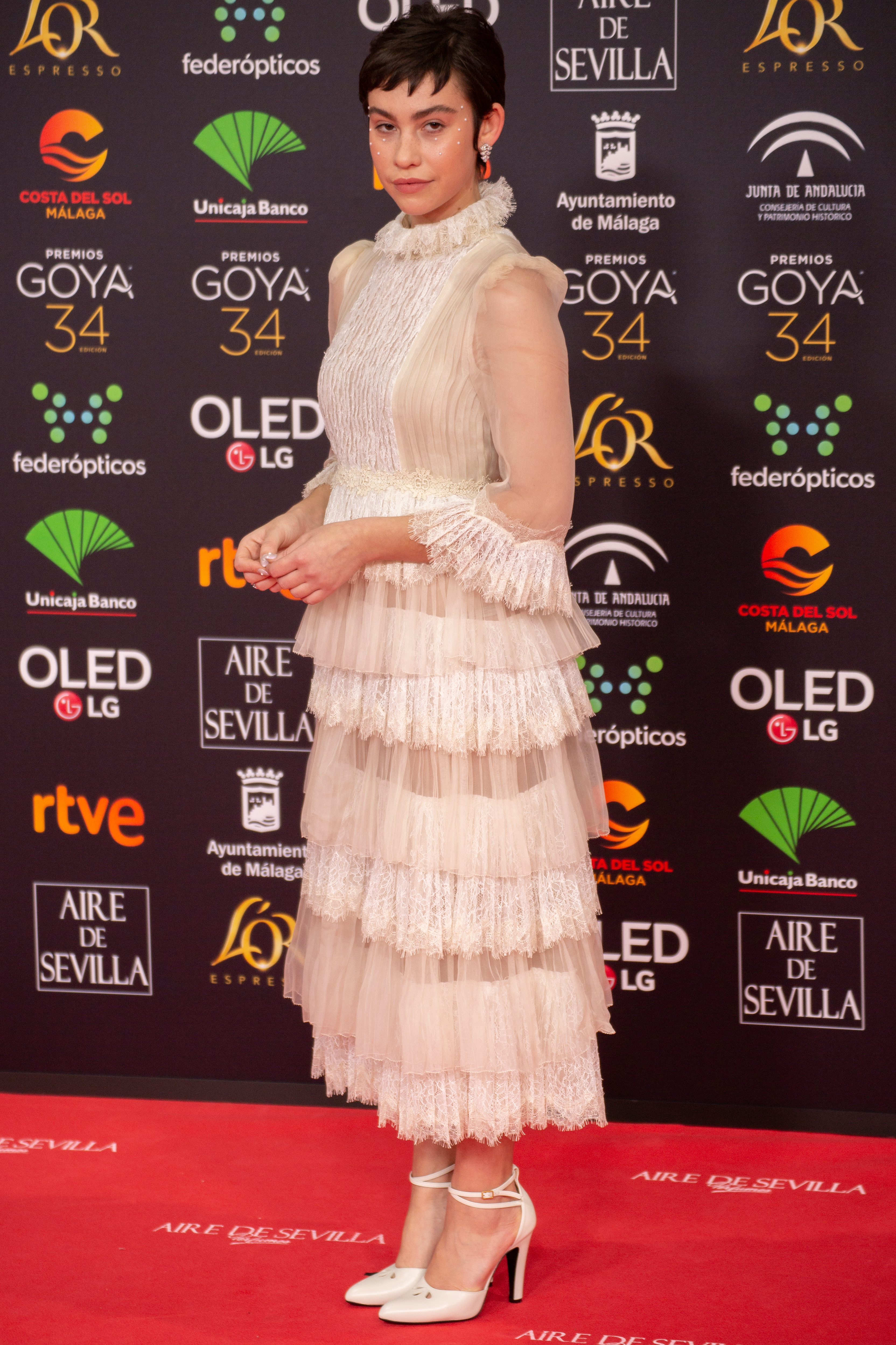 Greta Fernández en la alfombra roja de la ceremonia de entrega de los Premios Goya 2020, celebrados en Málaga